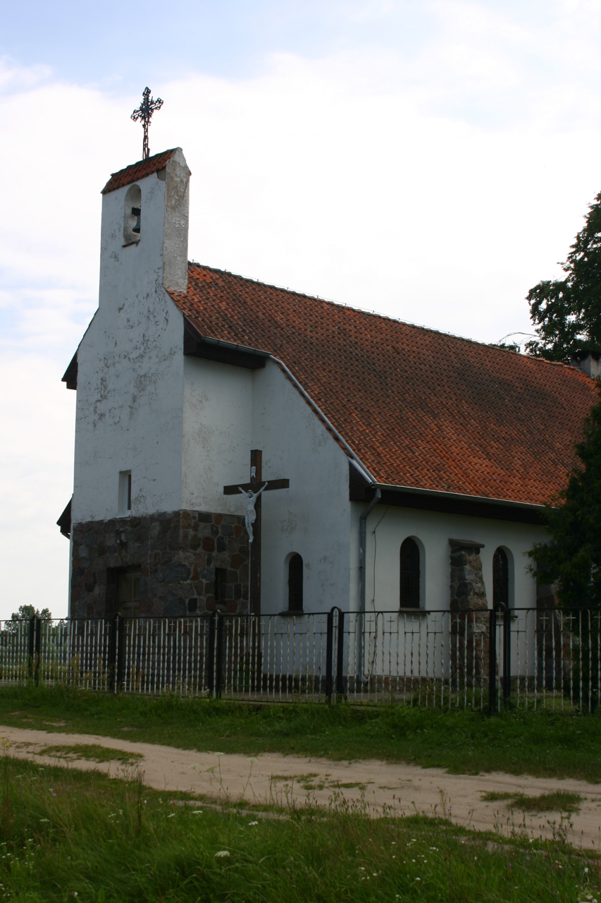 Die Kirche in Wilkowo in der Wojewodschaft Ermland-Masuren.